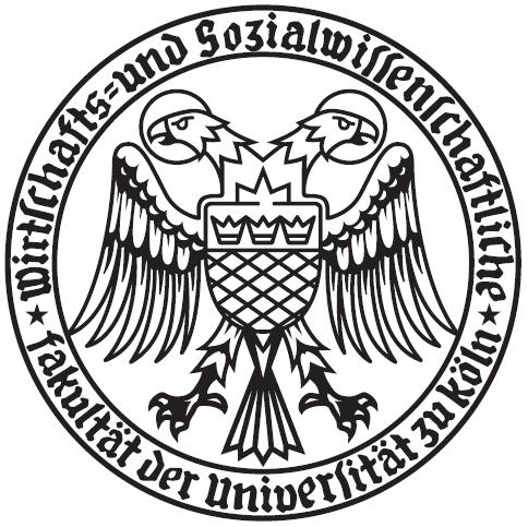 Logo Wirtschafts- und Sozialwissenschaftliche Fakultät der Universität zu Köln